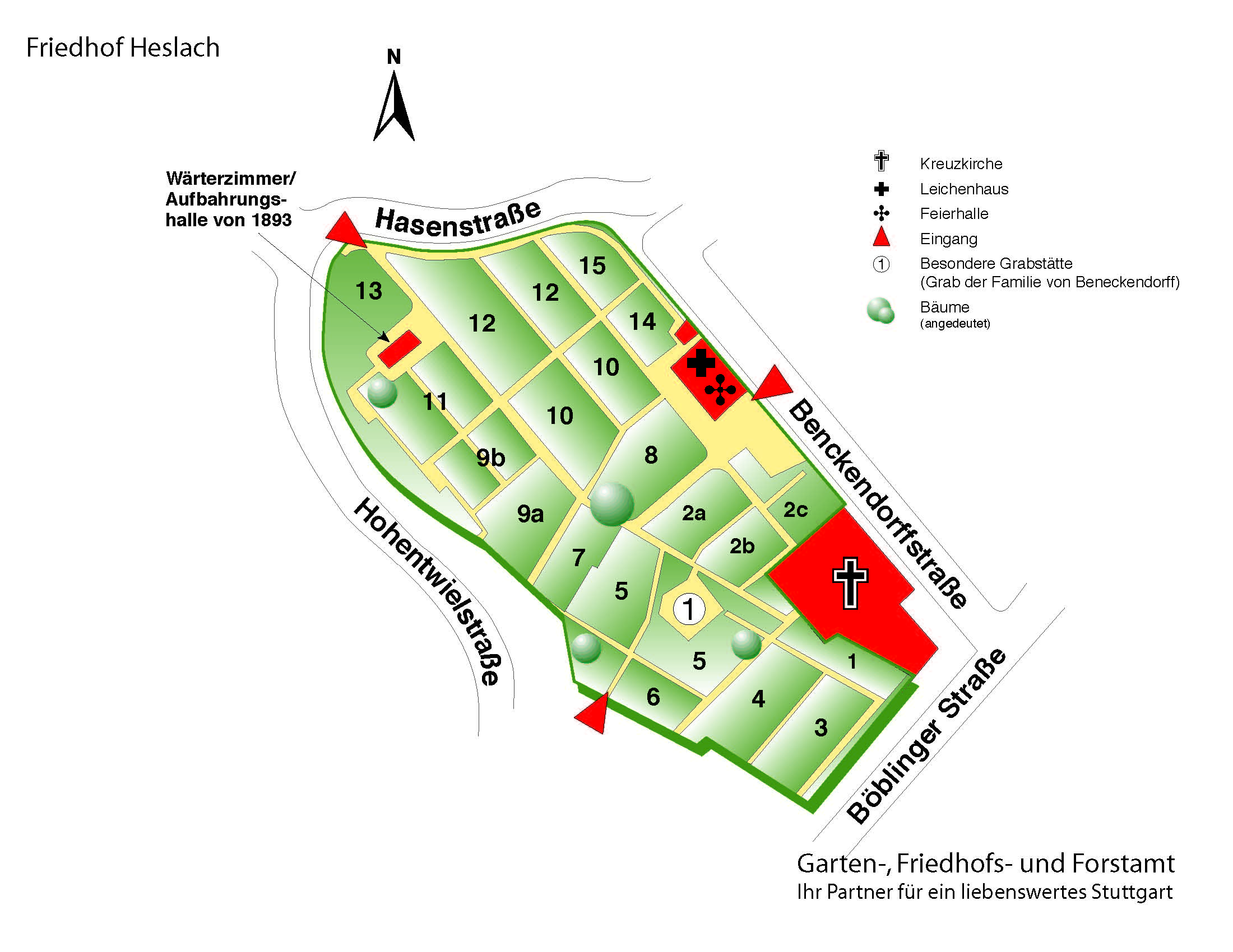 Plan des Friedhofs Heslach in Stuttgart.